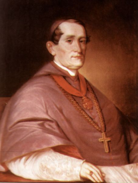 Józef Alojzy Pukalski (1798-1885) Bishop of Tarnów